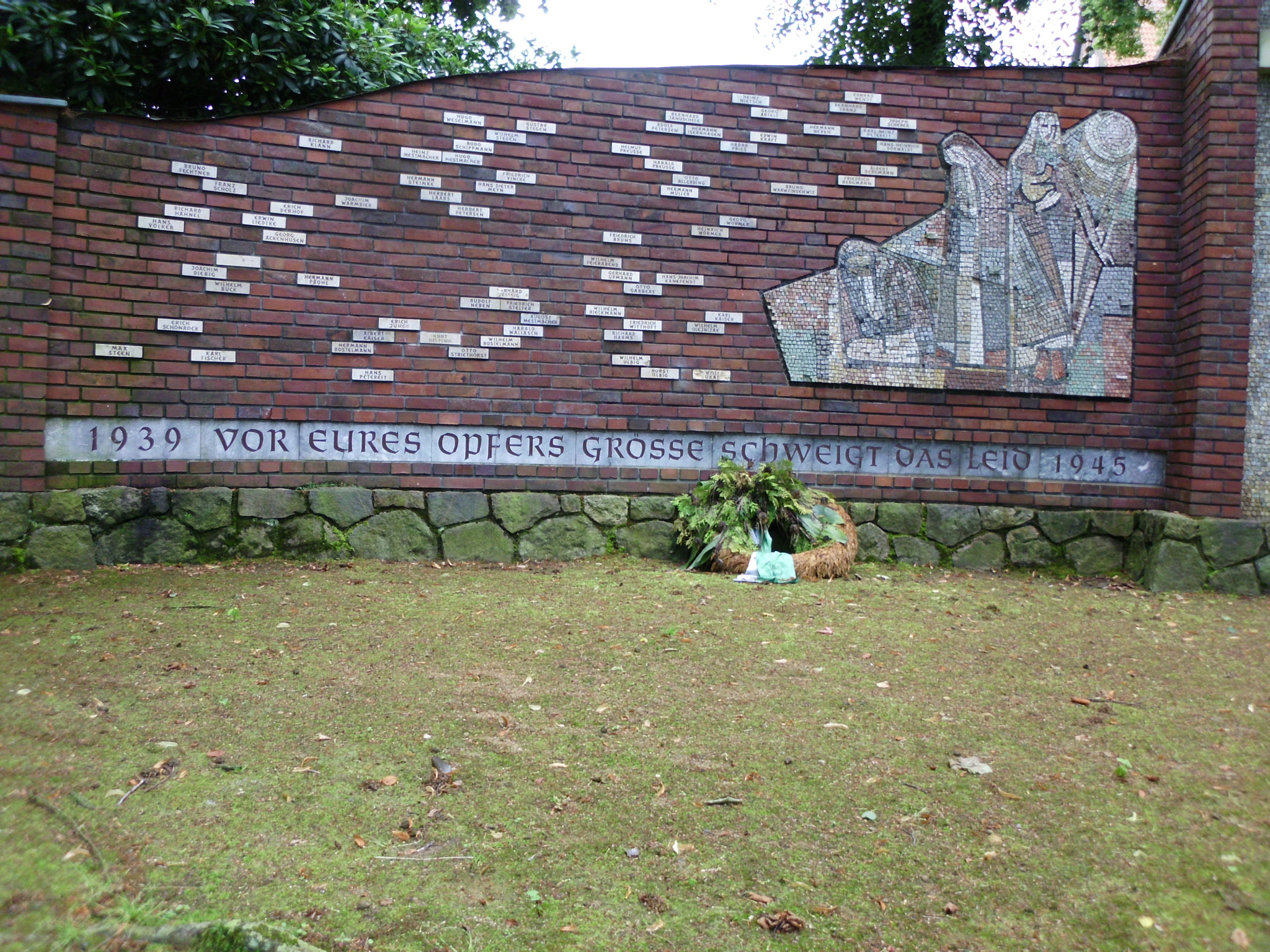 Kriegerdenkmal in Salzhausen